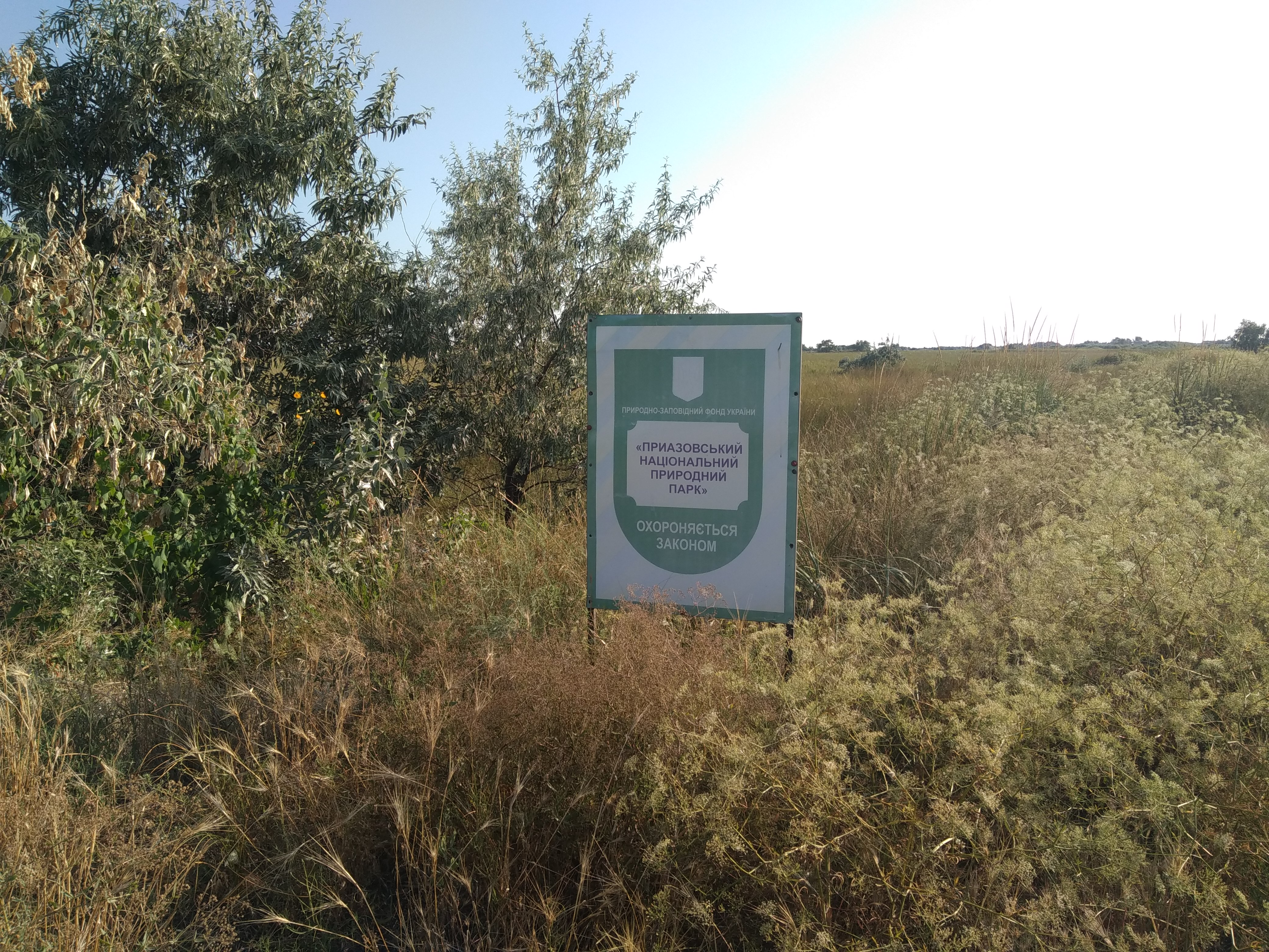 «Молочний лиман», Якимівський, Мелітопольський, Приазовський райони